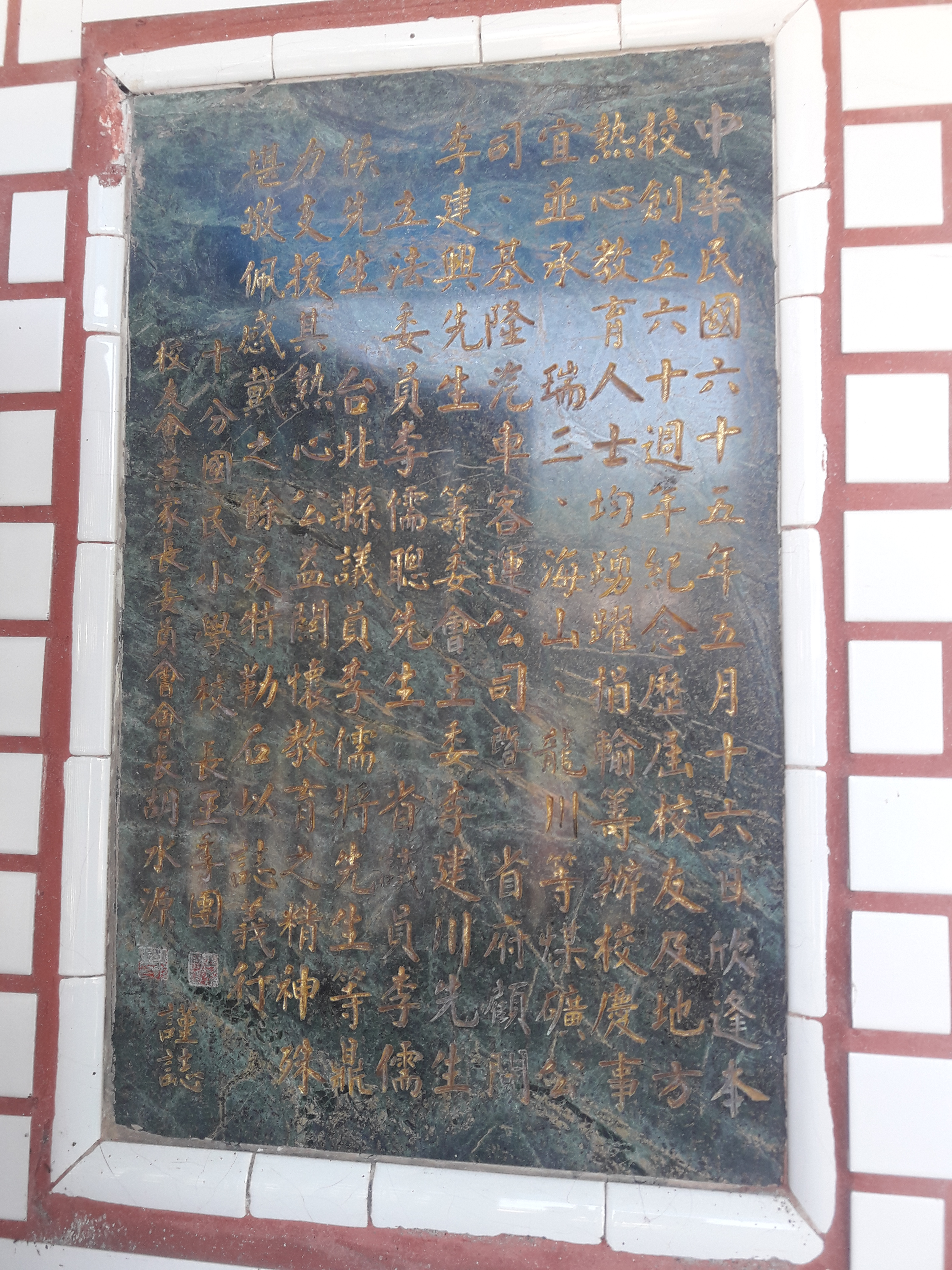 中文（台灣）: 位於辦公室外的石碑：「中華民國六十五年五月十六日，欣逢本校創立六十周年紀念，歷屆校友及地方熱心教育人士均踴躍捐輸籌辦校慶事宜，並承瑞三、海山、龍川等煤礦公司、基隆汽車客運公司、省府顧問李建興先生、籌委會主委李建川先生、立法委員李儒聰先生、省議員李儒侯先生、台北縣議員李儒將先生等鼎力支援，具熱心公益關懷教育之精神，殊堪敬佩感戴之餘，爰特勒石以誌義行。」